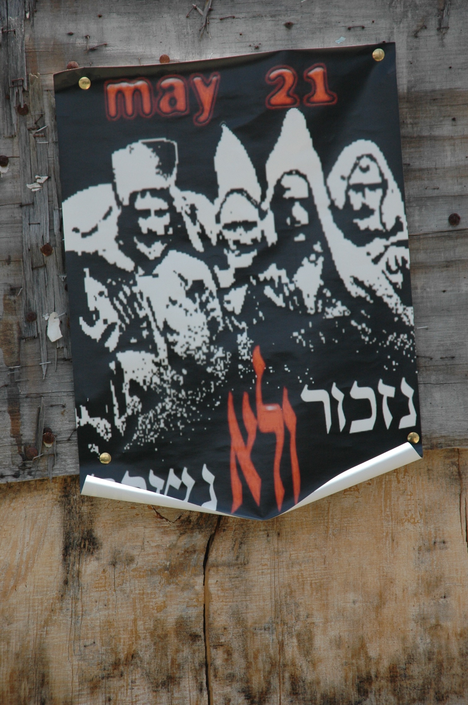 21 may